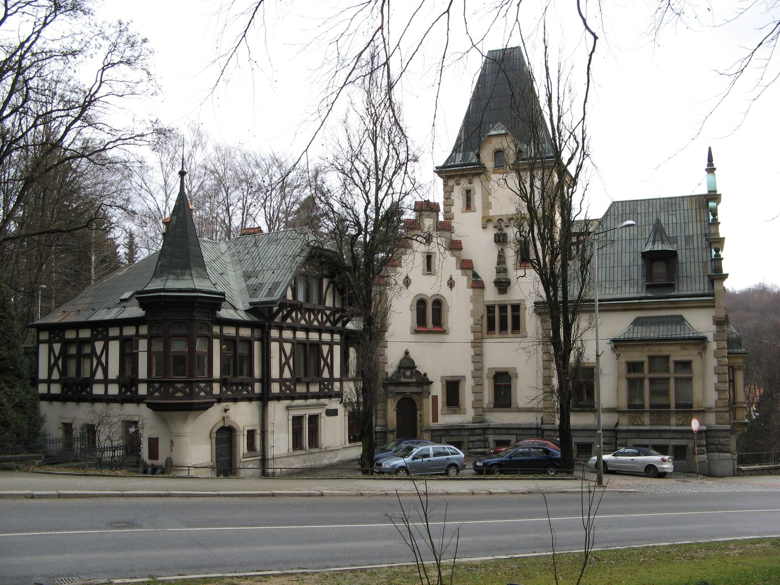 Liberec V-Kristiánov, Jablonecká 41/27. Liebiegův zámeček (vila Johana Liebiga).